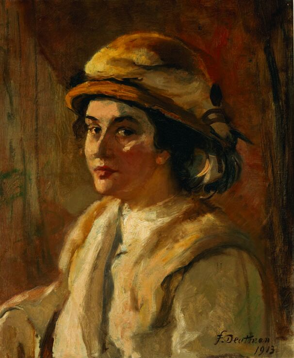 Meisjesportret. Olieverf op doek, 59 x 48 cm.